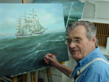 Peter Hagenah, an seiner Staffelei